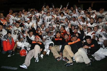 Leones Anáhuac Cancún. Campeones 2009 Conferencia Sur de la ONEFFA.